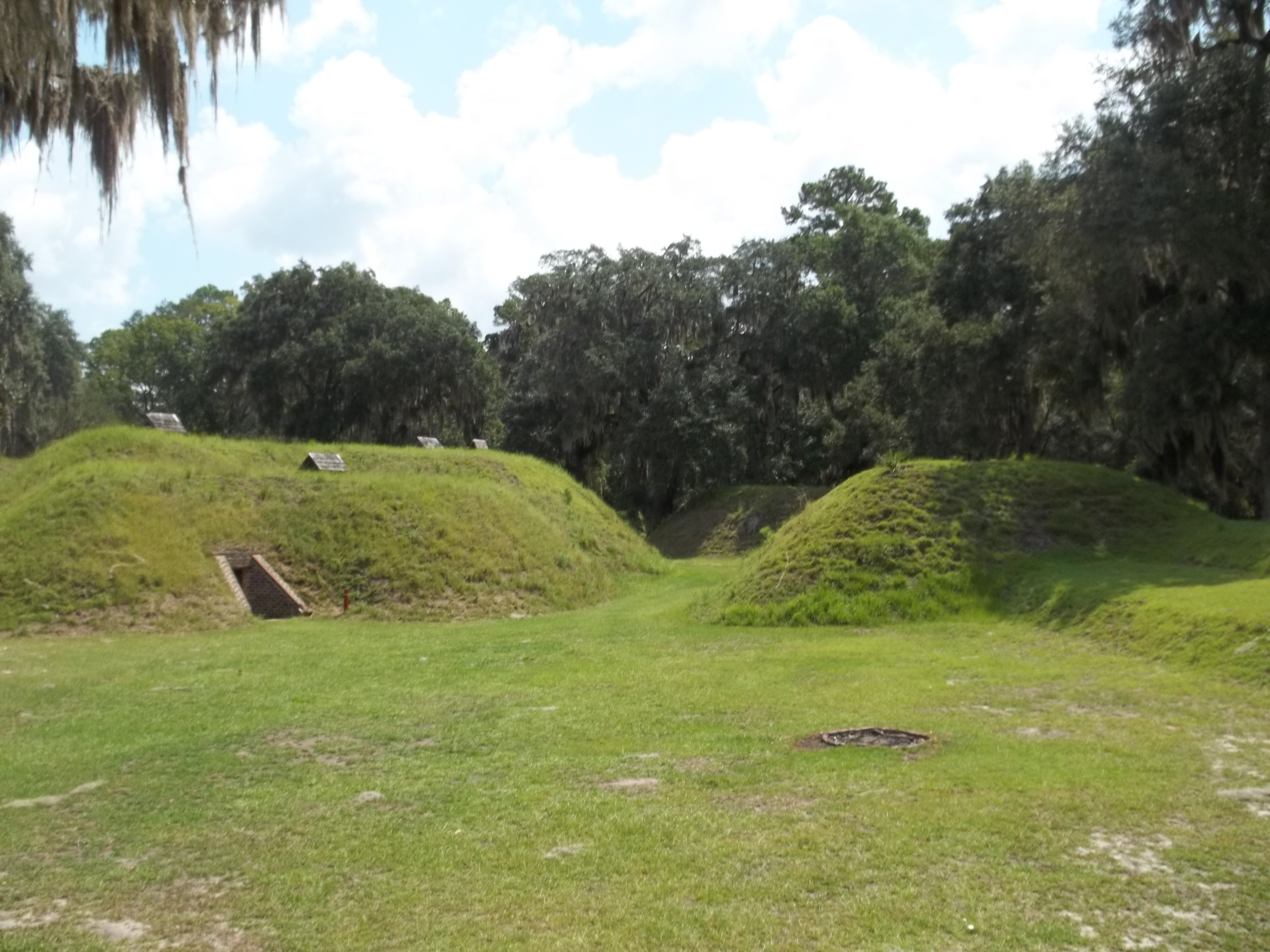 Richmond Hill, Georgia: Fort McAllister State Park